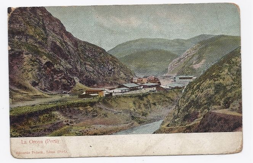 puente colgante sobre La Oroya